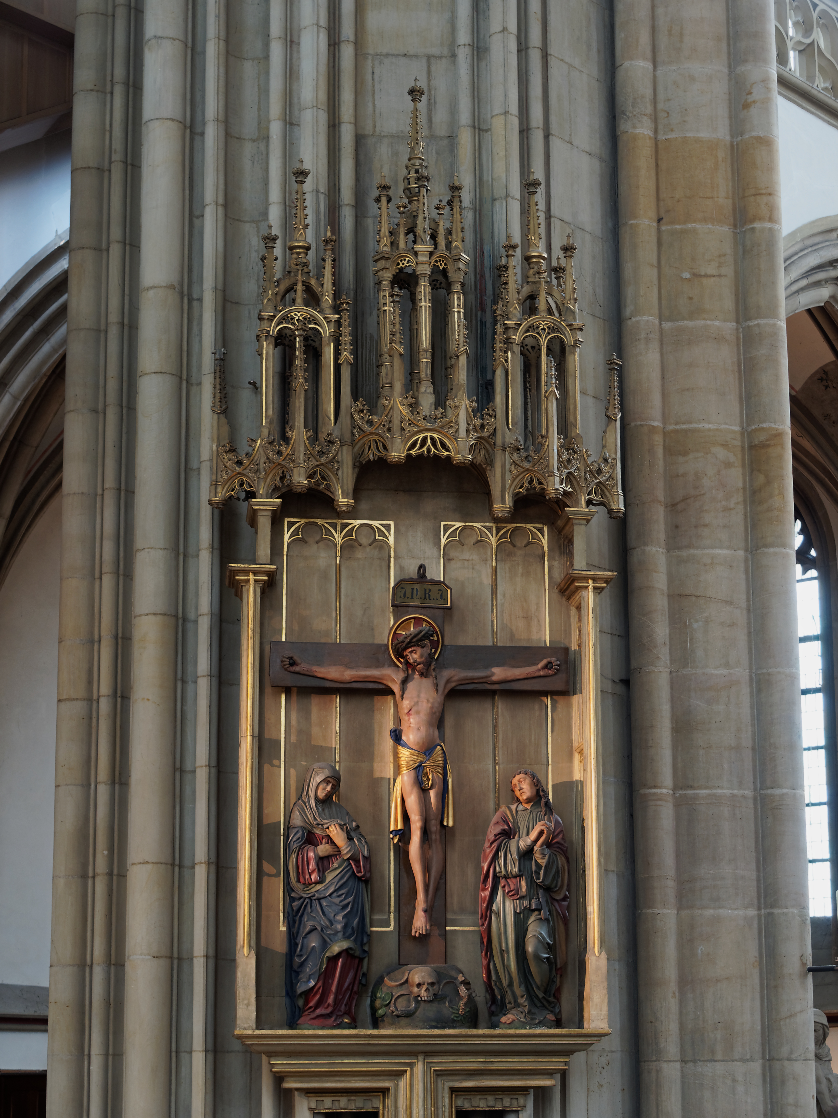 Lambertikirche Kreuzigungsgruppe, Franz Brabender zugeschrieben.